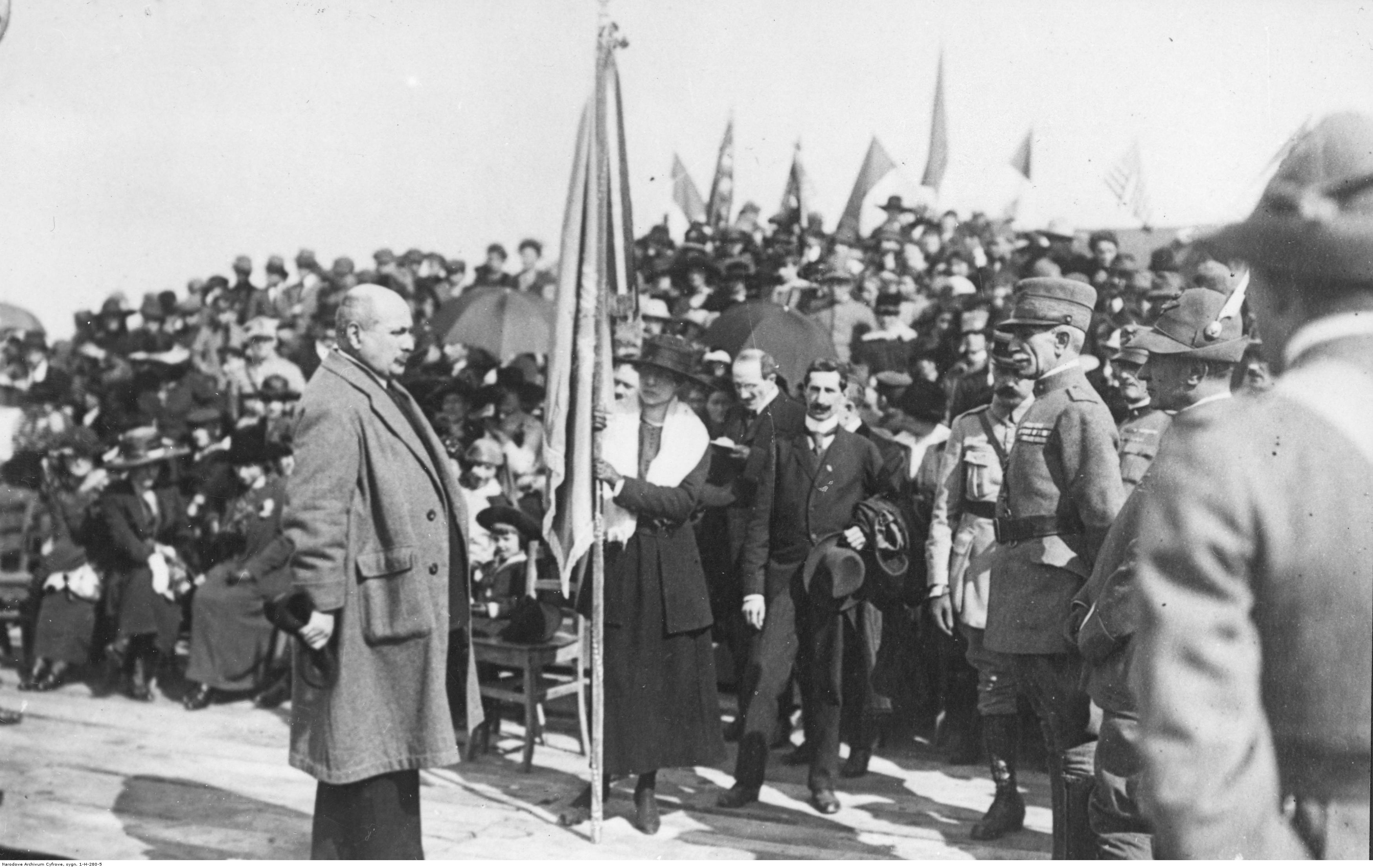 Polski obóz wojskowy w La Mandria di Chivasso. Burmistrz miasta Chivasso ofiarowuje sztandar dla pułku im. Zawiszy Czarnego. Koncern Ilustrowany Kurier Codzienny - Archiwum Ilustracji. Sygnatura: 1-H-280-5